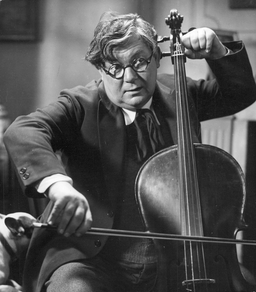 Erik "Bullen" Berglund spelar cello i filmen "En melodi om våren".